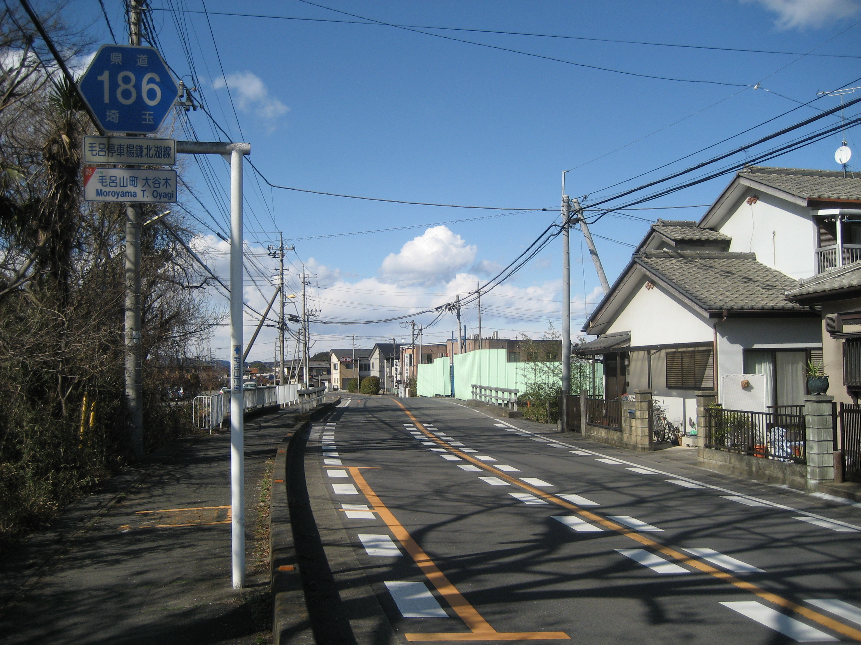 埼玉県道１８６号線毛呂山町内